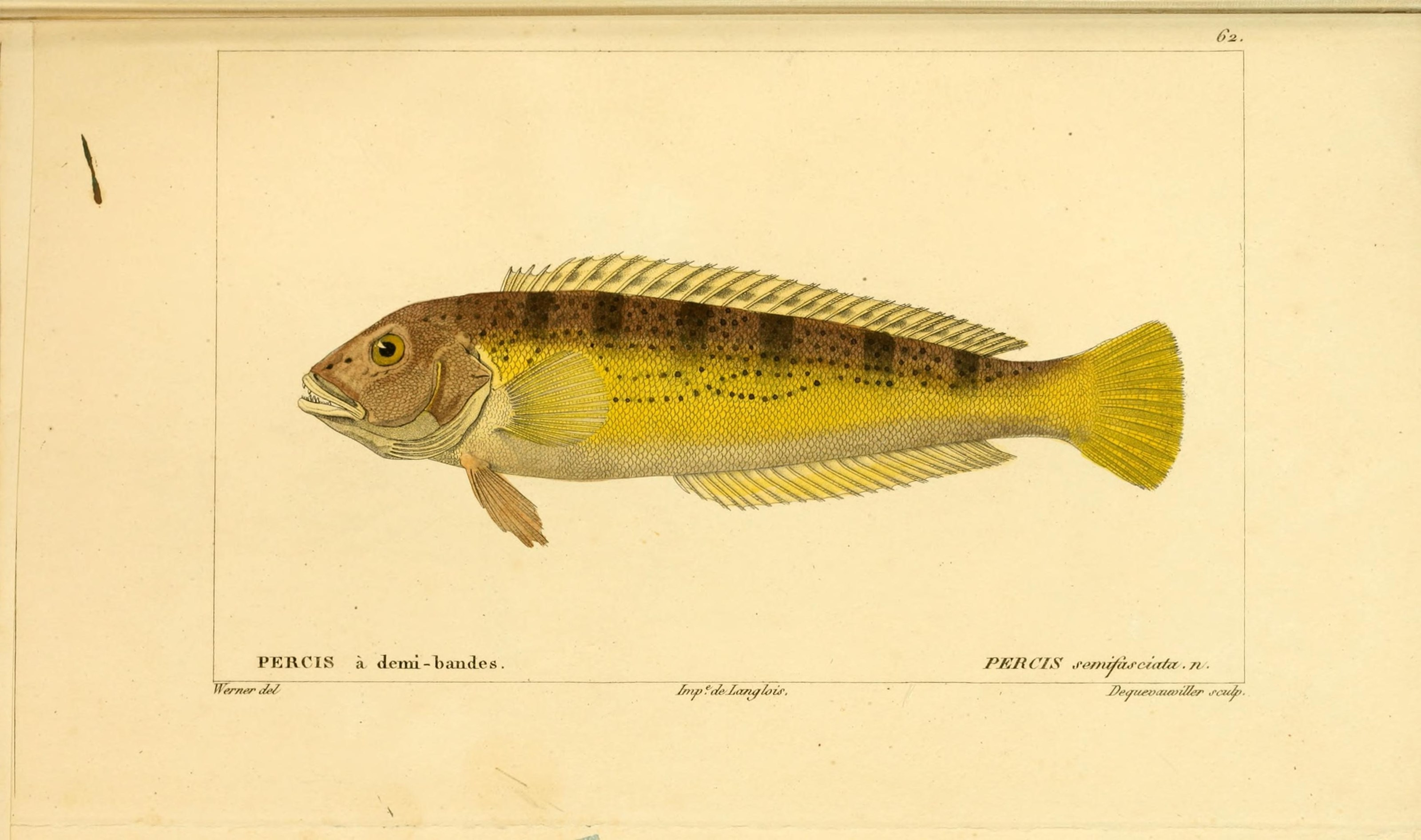 Pseudopercis semifasciata syn. Percis semifasciata Histoire naturelle des poissons / par m. le bon Cuvier ... et par M. Valenciennes.